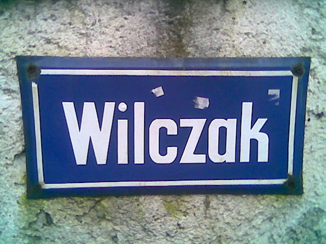 Tabliczka z nazwą ulicy Wilczak (Poznań).